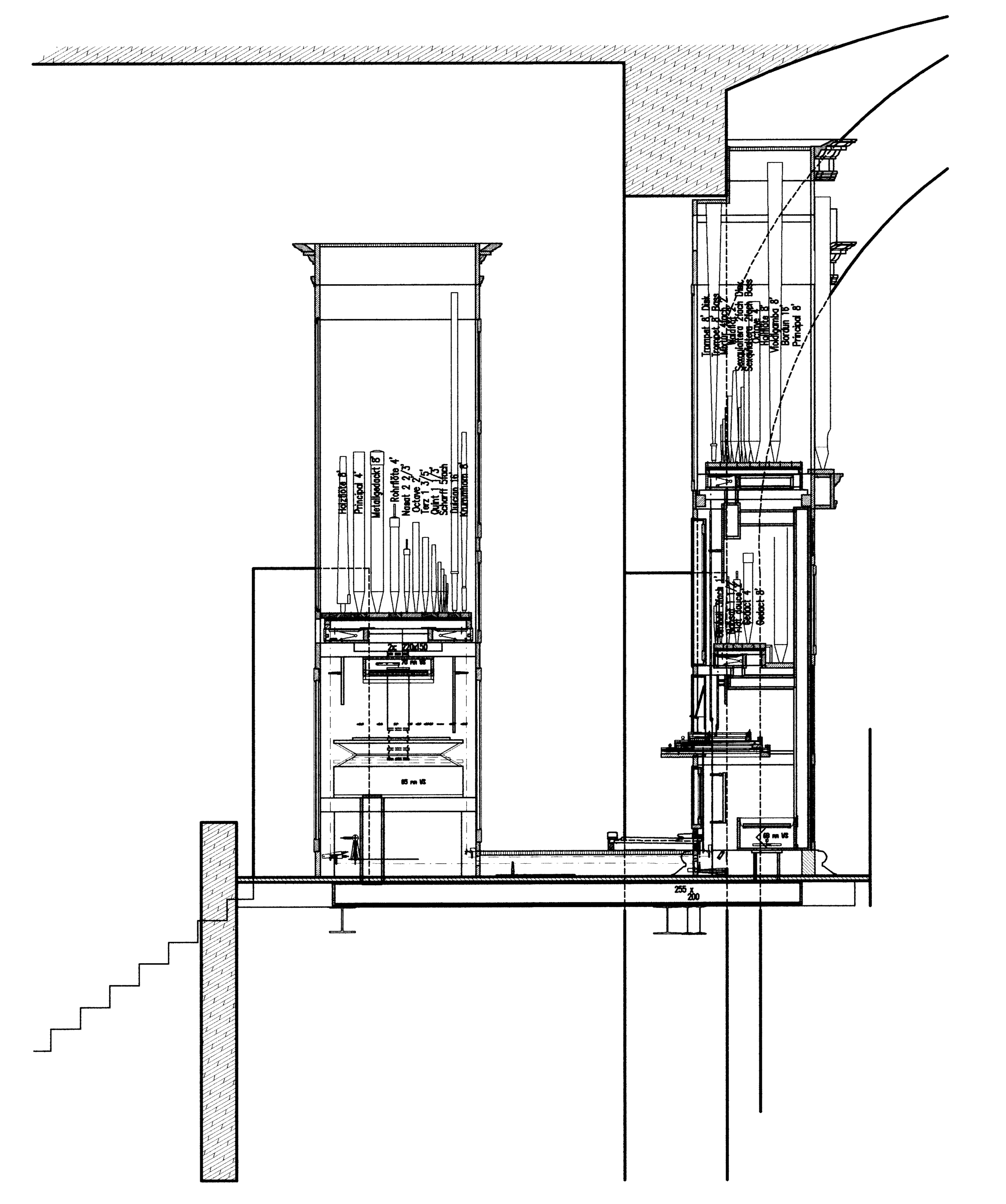 Orgel der Kilianikirche Höxter - Seitenschnitt